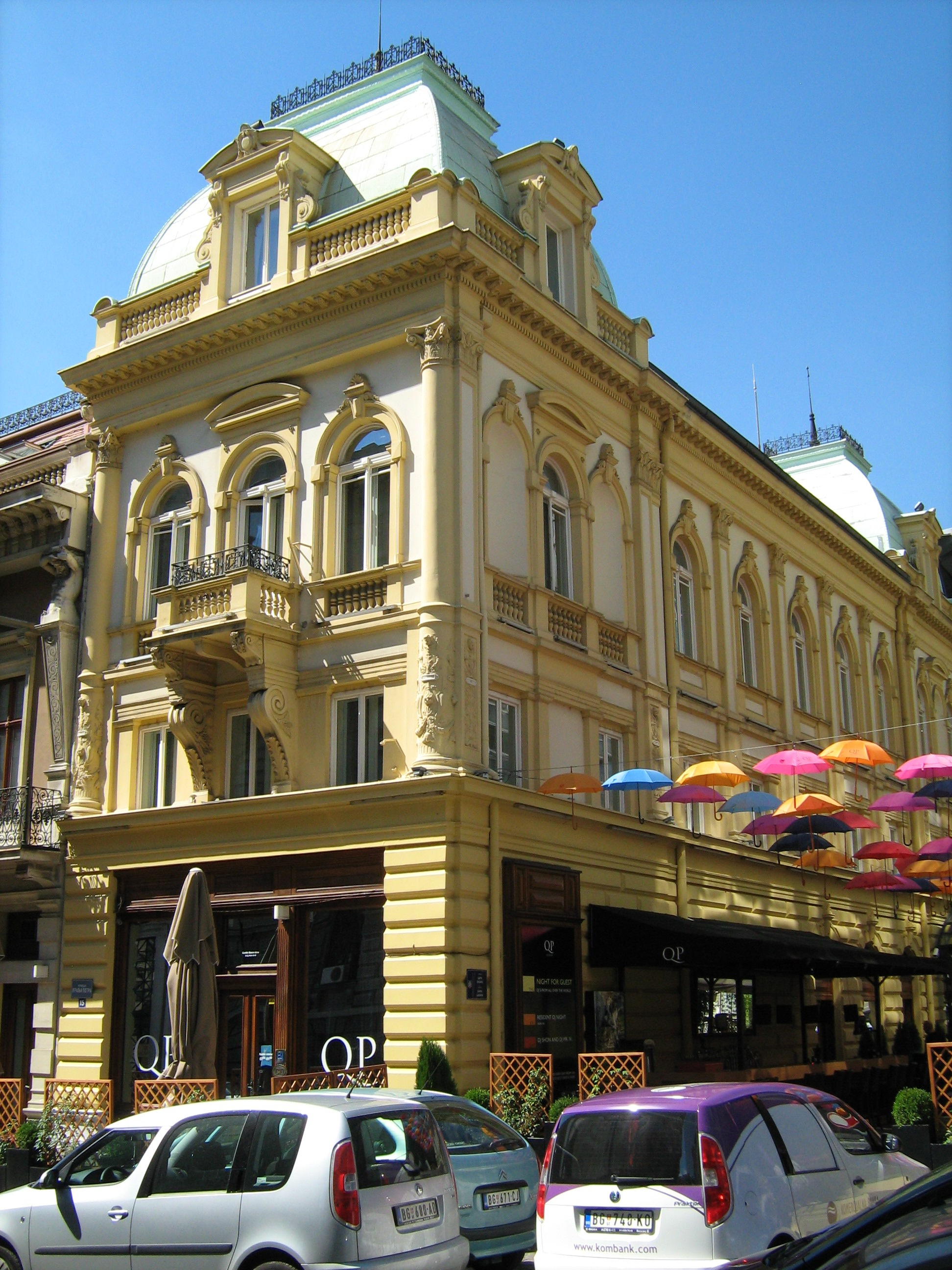 Кућа трговца Црвенчанина, краља Петра 15, Београд